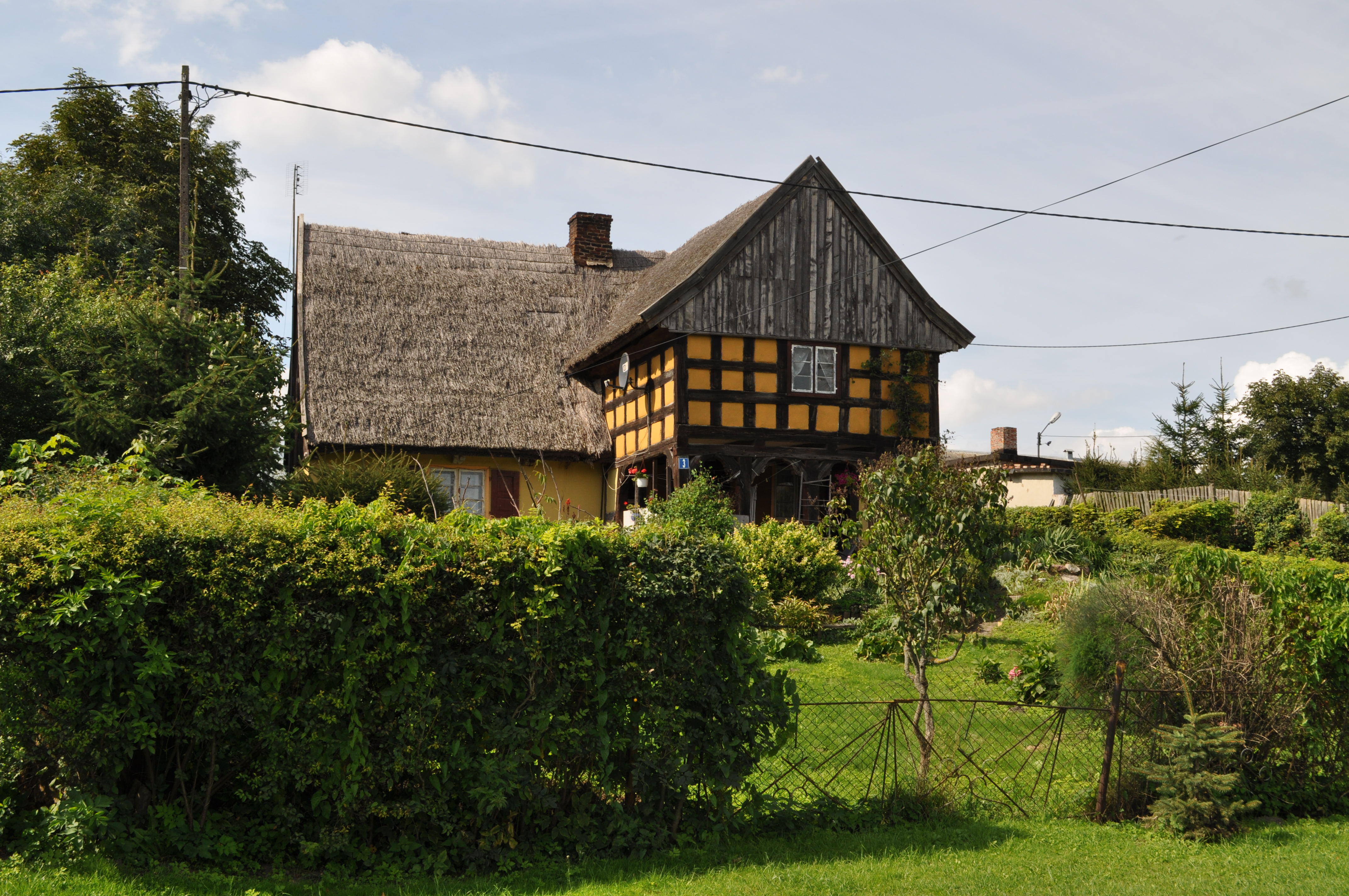 Pilona - dom podcieniowy nr 10, 1786 (wg KB - 3)